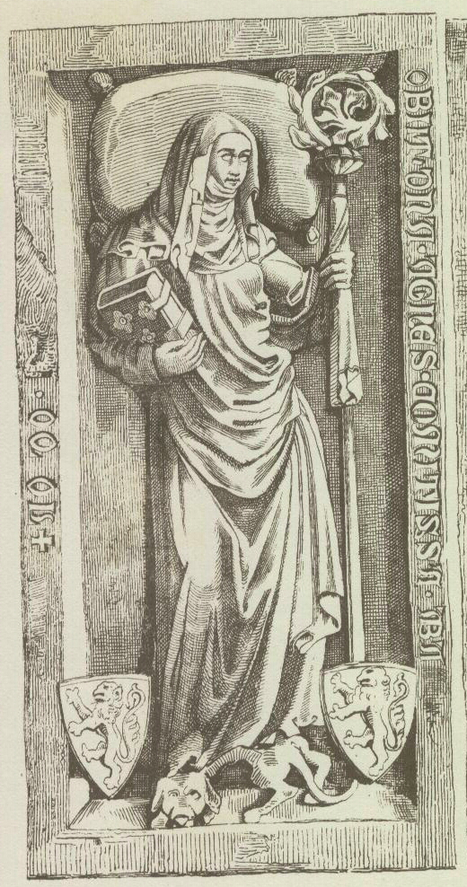 Agnes Gräfin von Orlamuende, Äbtissin von Himmelkron